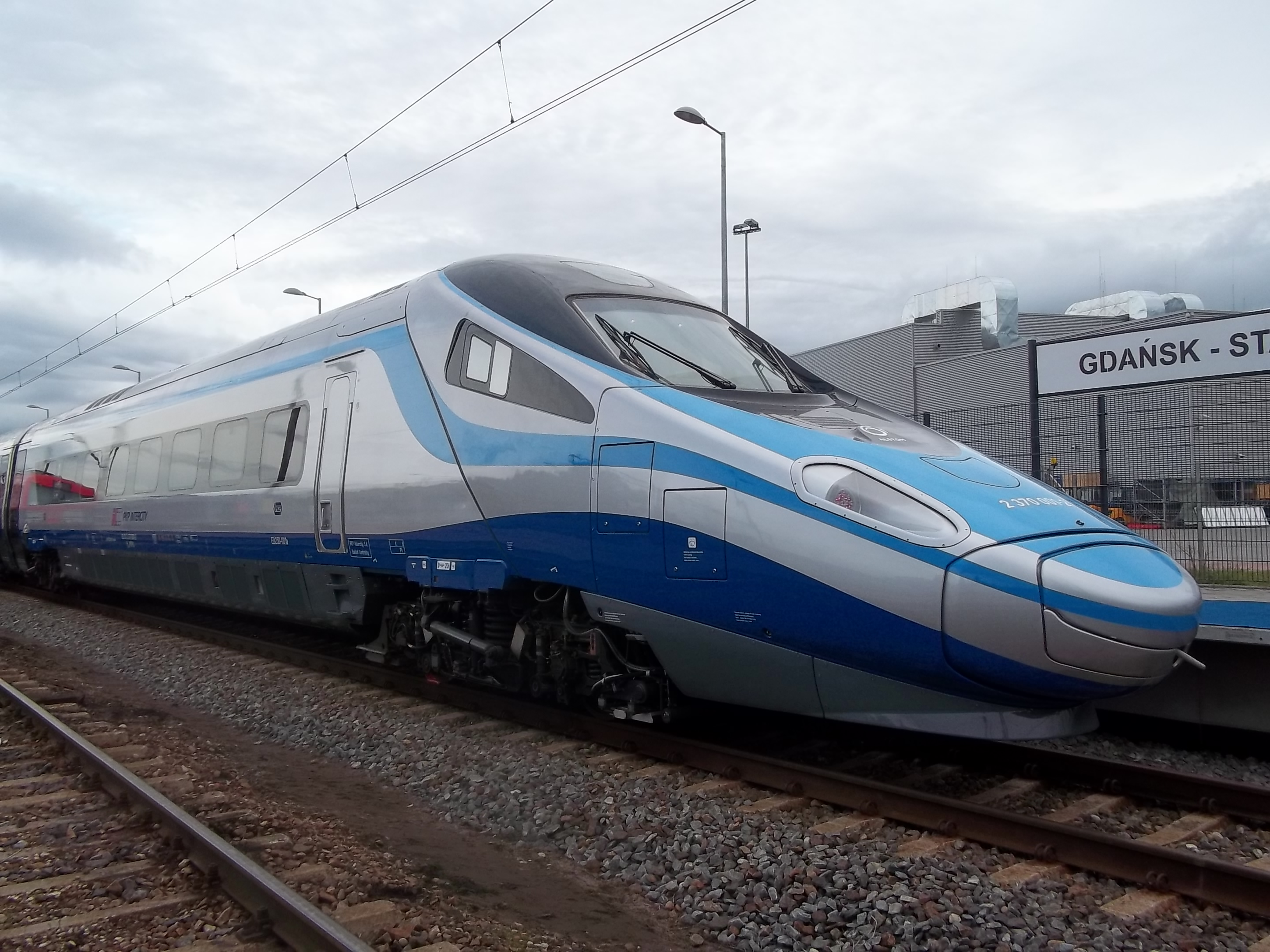 ED250-001 "Pendolino" w Gdańsku.